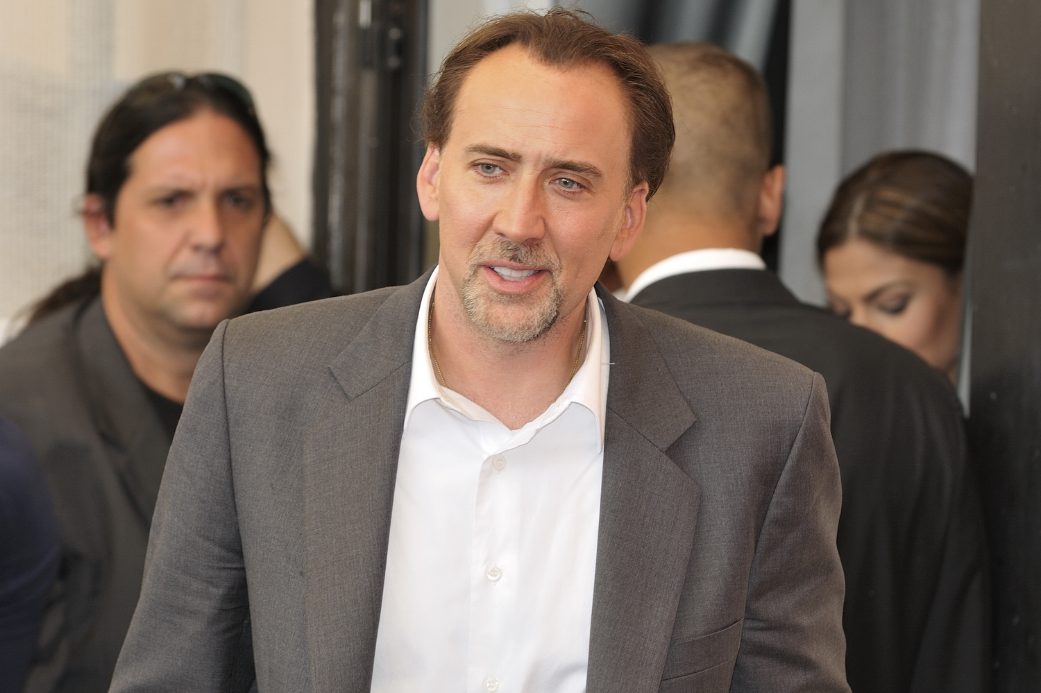 66ème Festival du Cinéma de Venise (Mostra), 3ème jour (04/09/2009) Photocall avec Nicolas Cage, Eva Mendes et le réalisateur Werner Herzog pour le film : Bad Lieutenant : Port of Call New Orleans